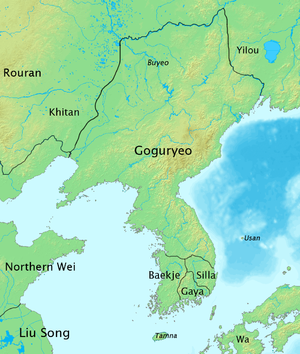 goguryeo